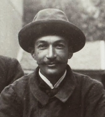 [Collection Jules Beau. Photographie sportive] : T. 10. Année 1899 / Jules Beau : F. 7v. [Course automobile du Tour de France, 1899]